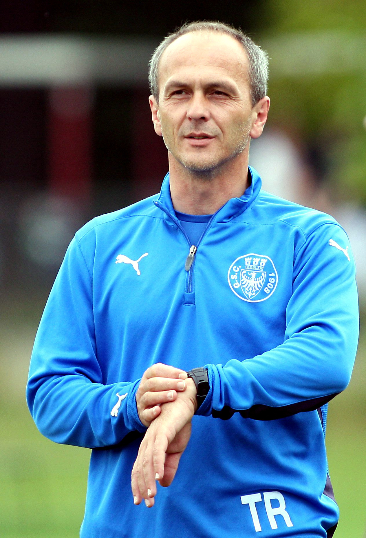 Goran Barjaktarevic